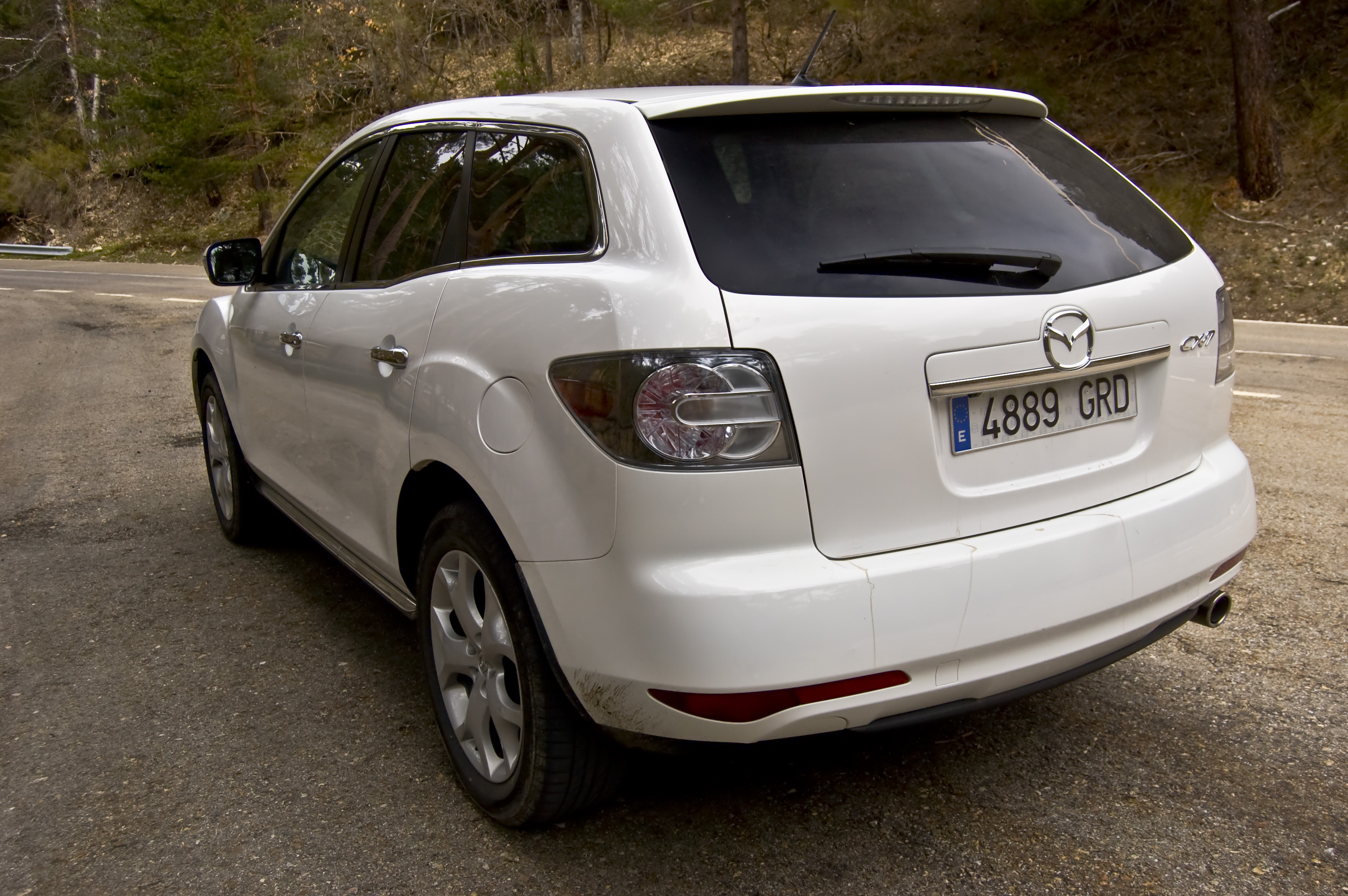 Prueba del Mazda CX-7 para Diariomotor